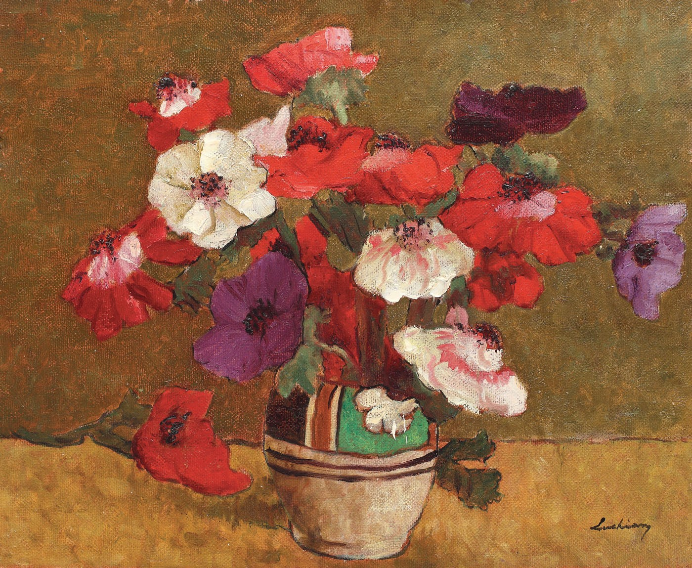 Anemone, ulei pe pânză, 46 × 56 cm, semnat dreapta jos, cu negru, "Luchian"